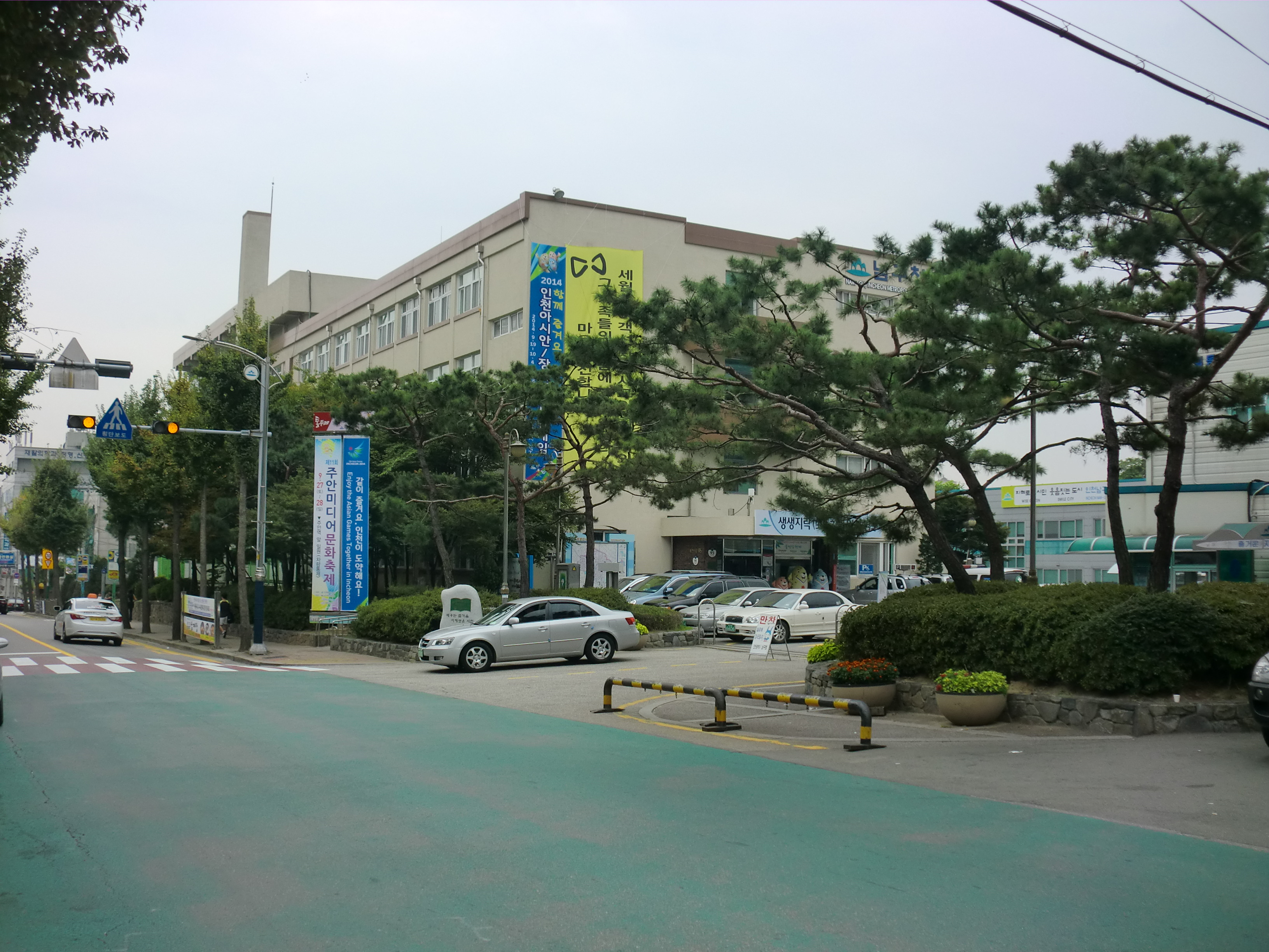 인천광역시 남구에 있는 남구청